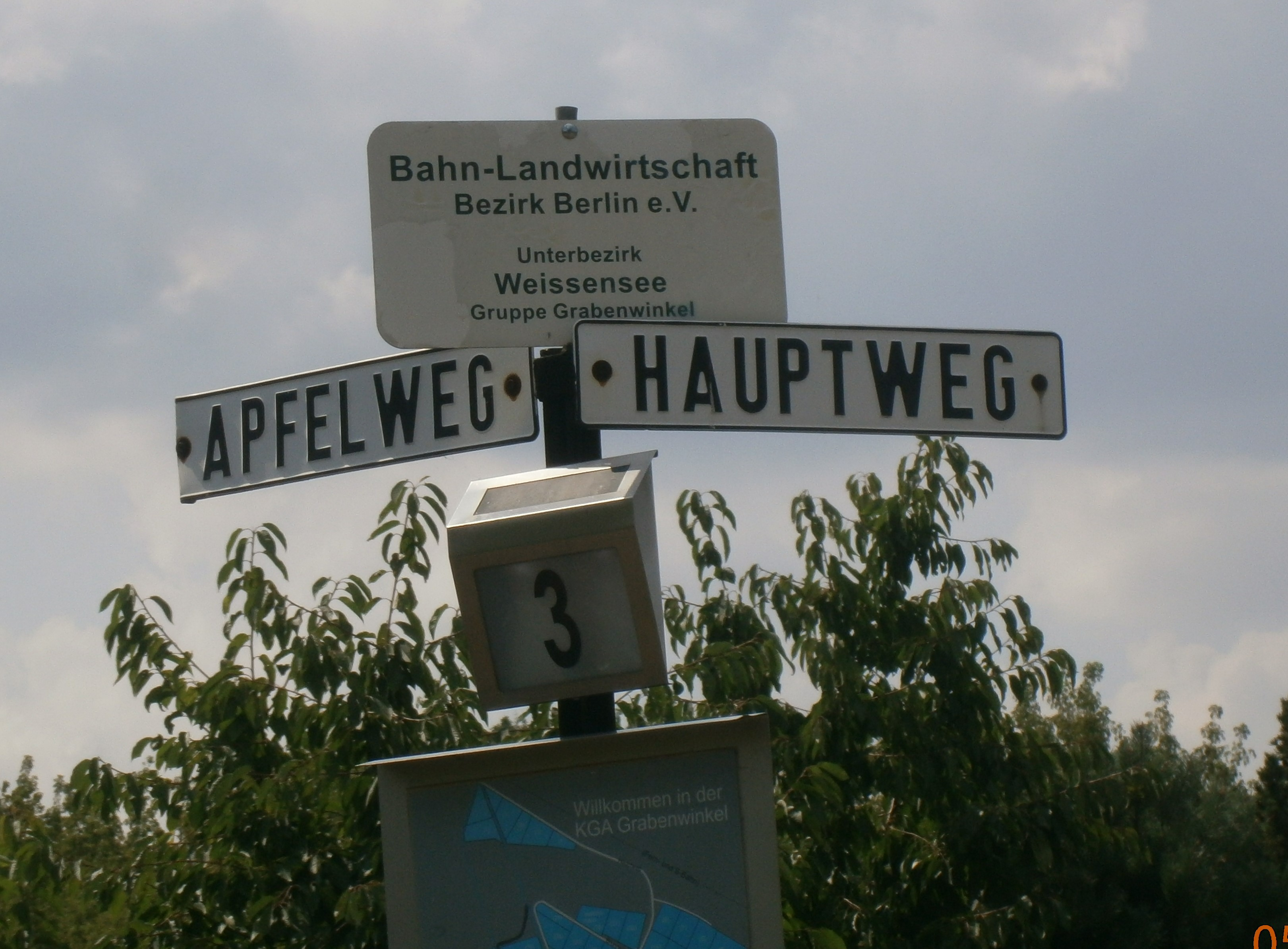 Der Rotkardinalweg ist eine amtlich benannte Privatstraße in der Siedler- und Gartenanlage Blankenburg im Südwesten von Berlin-Blankenburg. Hier am Eckpunkt des Spechtfink- mit dem Rotkardinalweg ist der Zugang zur Bahnlandwirtschaft mit dem apfel- und dem Hauptweg, die ihrerseits nichtamtliche Wegenamen der KGA Grabenwinkel sind.